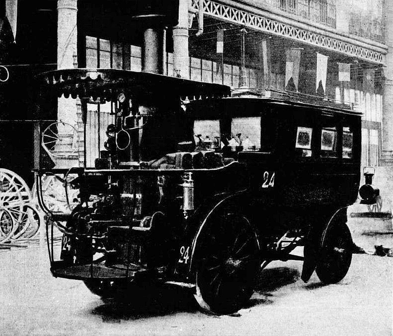 Omnibus à vapeur du mançois Amédée Bollée 'La Nouvelle', n°24 à 6 places, au départ de Paris-Bordeaux-Paris 1895 - La Science Française, juin 1895, p.329